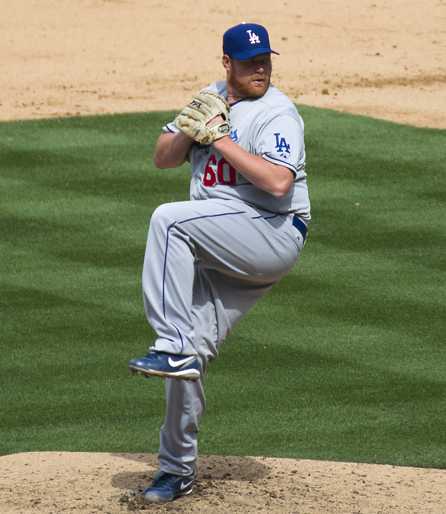 Todd Coffey